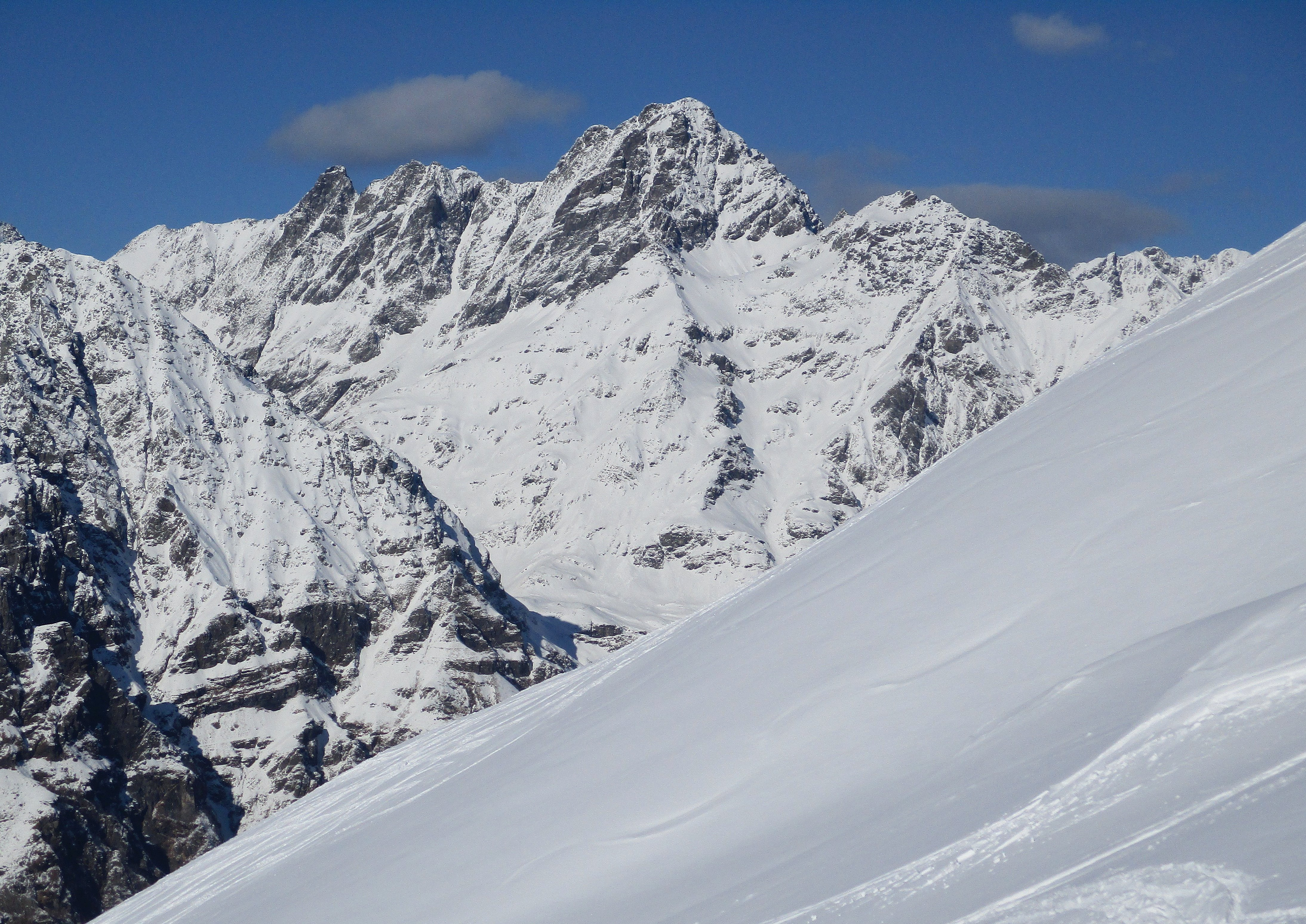 parco regionale delle Orobie Bergamasche (Q3895555)